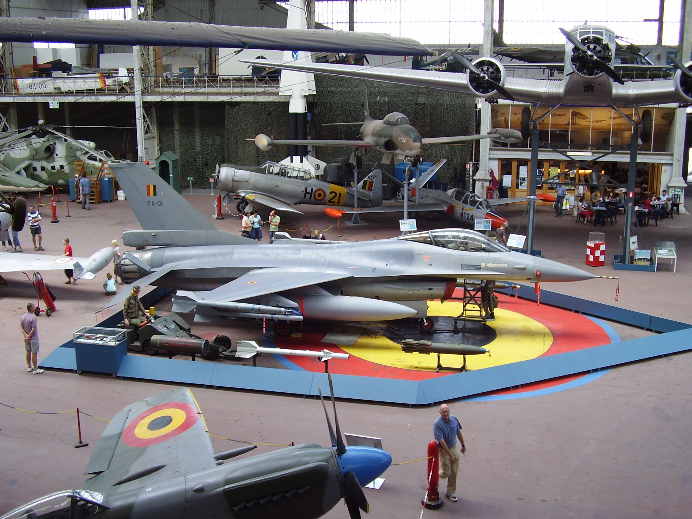 Royal Military Museum Brussels, Musée Royal de l'Armée, Koninklijk Museum van het Leger en de Krijgsgeschiedenis